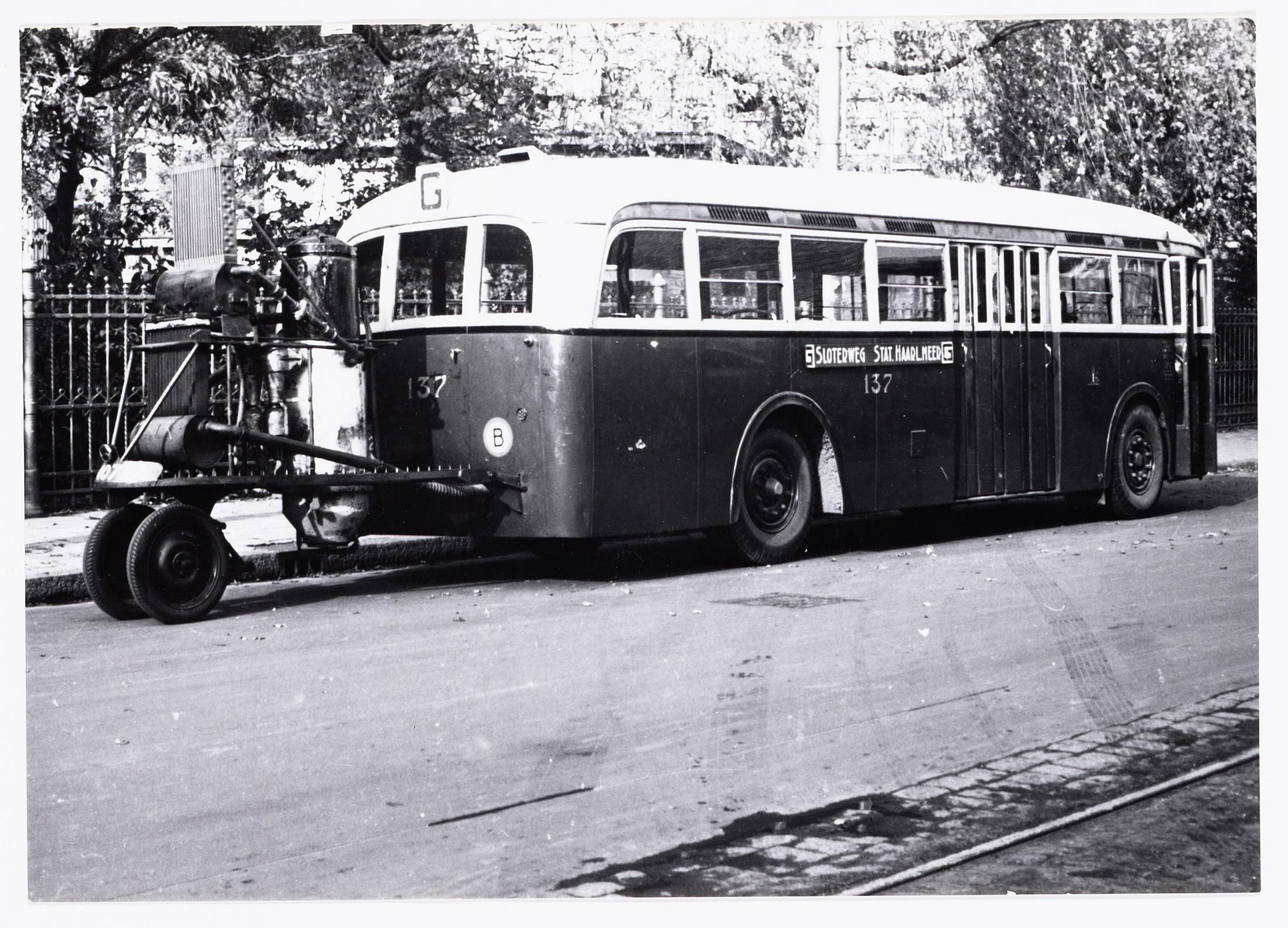 Beschrijving Haarlemmermeerstation, Amstelveenseweg 262-266 Op enkele onmisbare autobuslijnen, waren tijdens de oorlog wegens schaarste van benzine, de autobussen voorzien van houtgas-generatoren. Buslijn G (autobus 137) Sloterweg - Haarlemmermeerstation. Foto uit collectie T.W. Hogendijk. Documenttype foto Vervaardiger Onbekend Anoniem Collectie Collectie Stadsarchief Amsterdam: foto-afdrukken Datering 1945 ca. Geografische naam Amstelveenseweg Inventarissen Afbeeldingsbestand OSIM00008000672